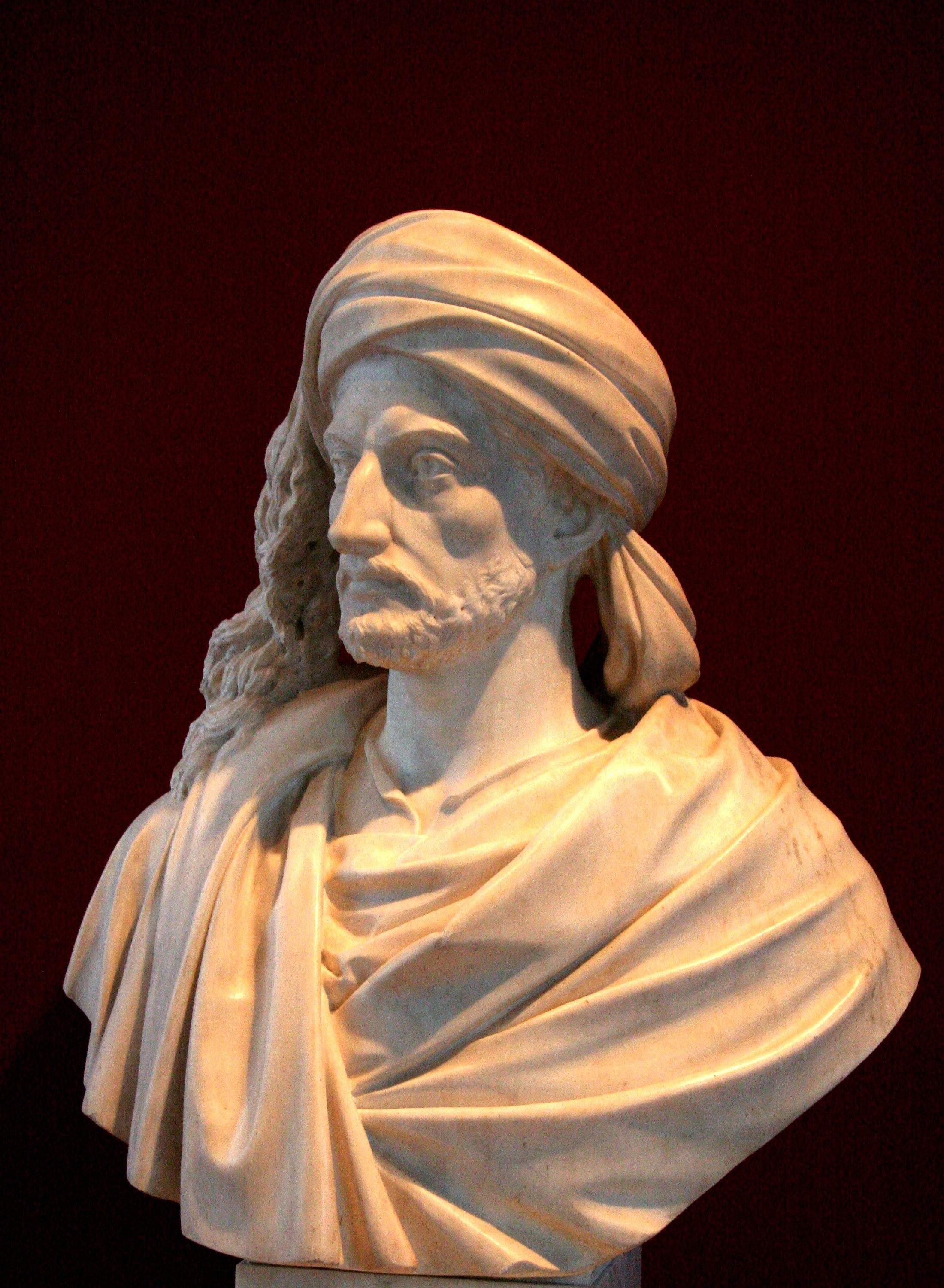 Buste de René Caillié by Alexandre Oliva (1823-1890) conservé au musée Bernard d'Agesci à Niort (France)